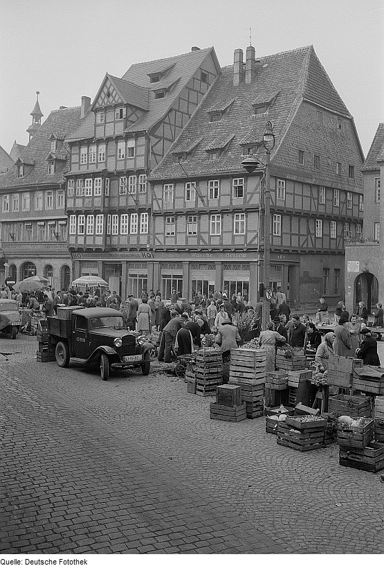 Original image description from the Deutsche Fotothek Ansicht mit Verkaufsständen